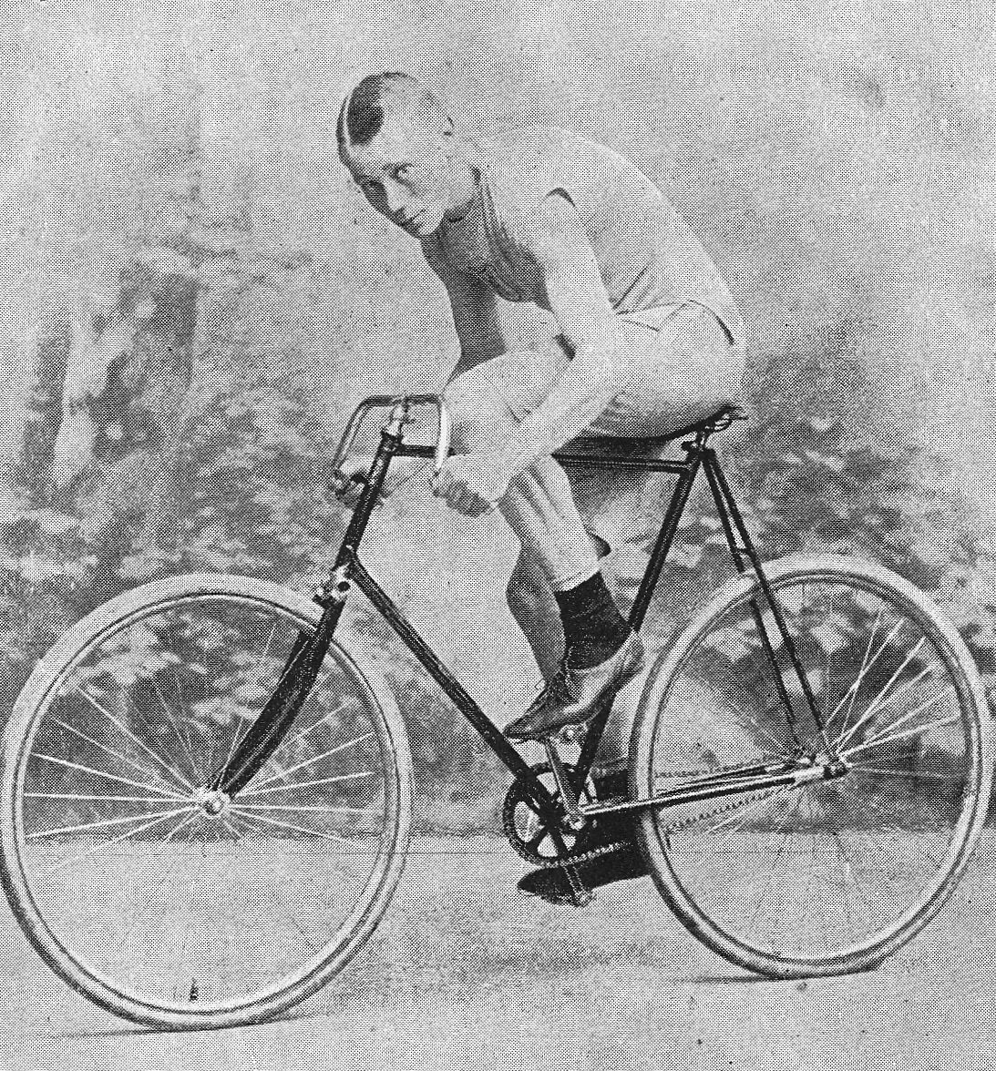 Wilhelm Henie, norwegischer Radsportler (1894) S. 222